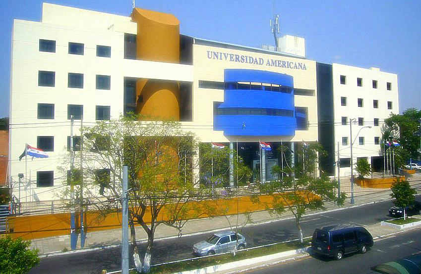 Edificio de la Universidad Americana de Asunción Paraguay